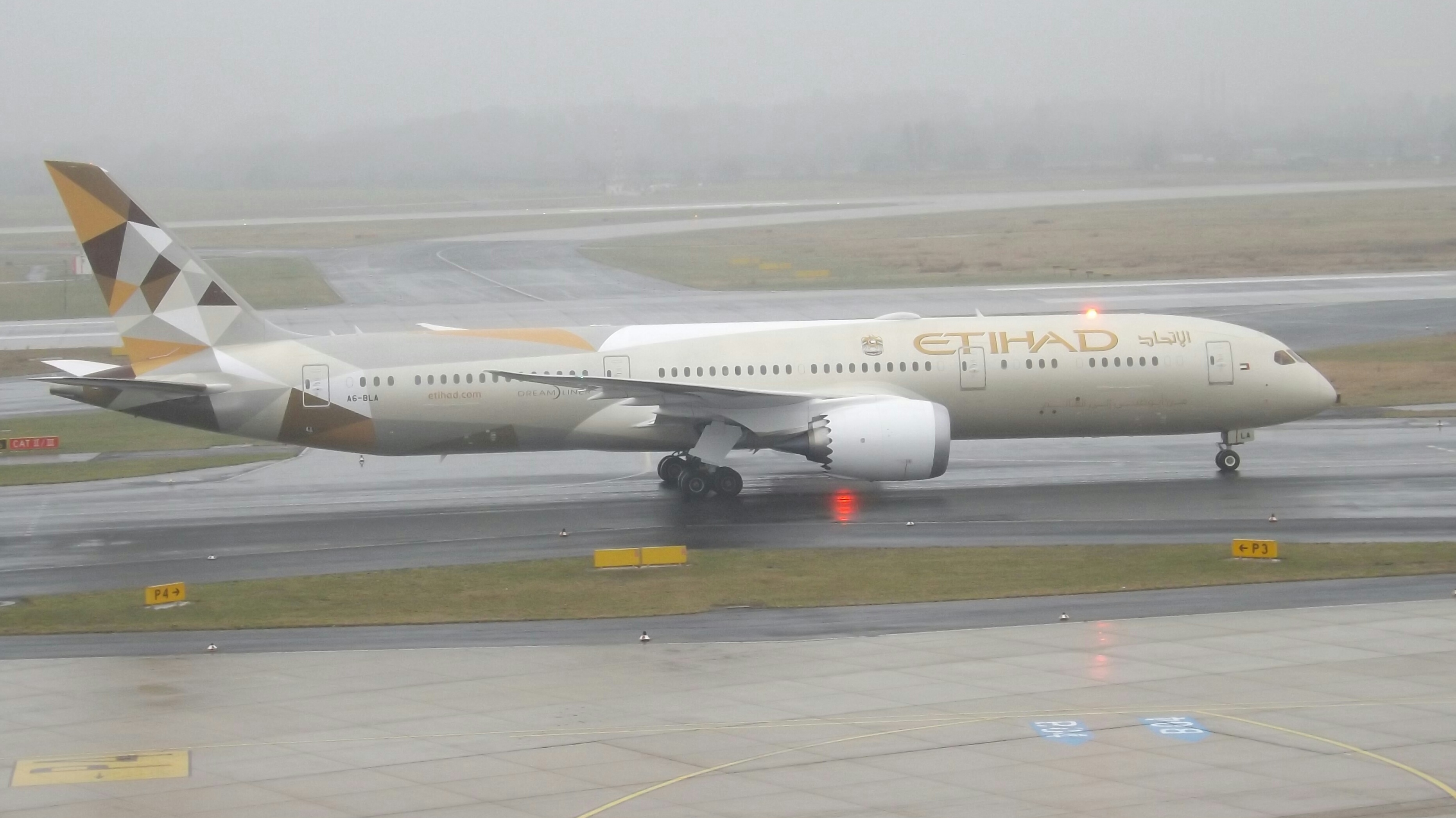 Erster Linienenflug einer Boeing 787-9 von Etihad in Düsseldorf